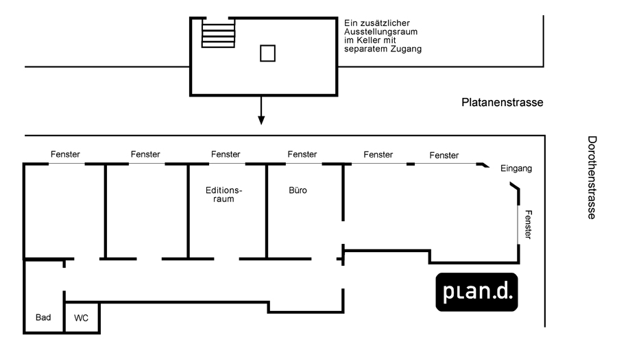 Galerieplan der produzentengalerie plan.d.